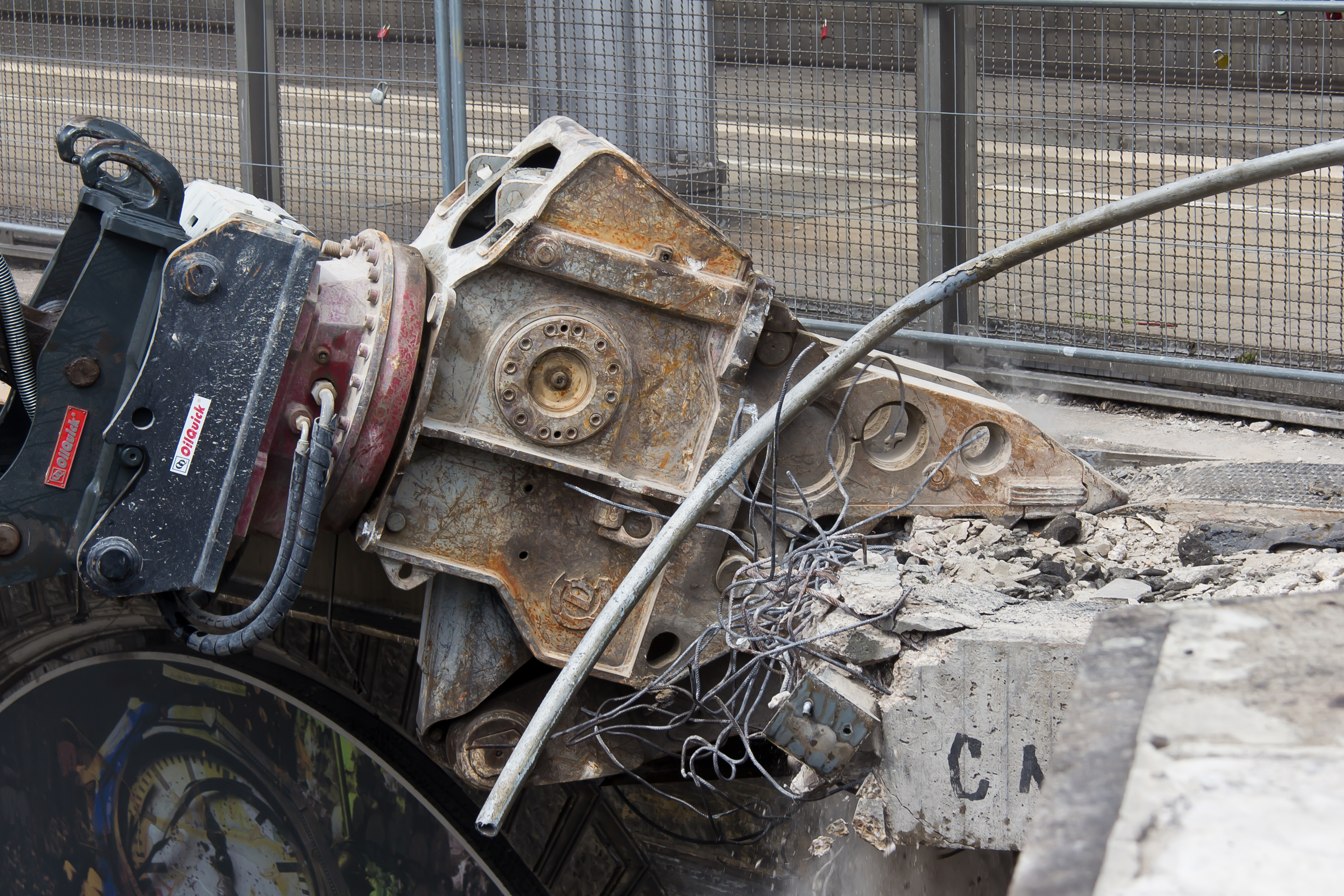 Köln. Neugestaltung der östlichen Domumgebung. Abbruch des Zugangs vom östlichen Umfeld des Kölner Doms zum Gleis 1 des Kölner Hauptbahnhofs. Zum Einsatz kommt ein Bagger Typ Liebherr 924 mit Abbruchzange.